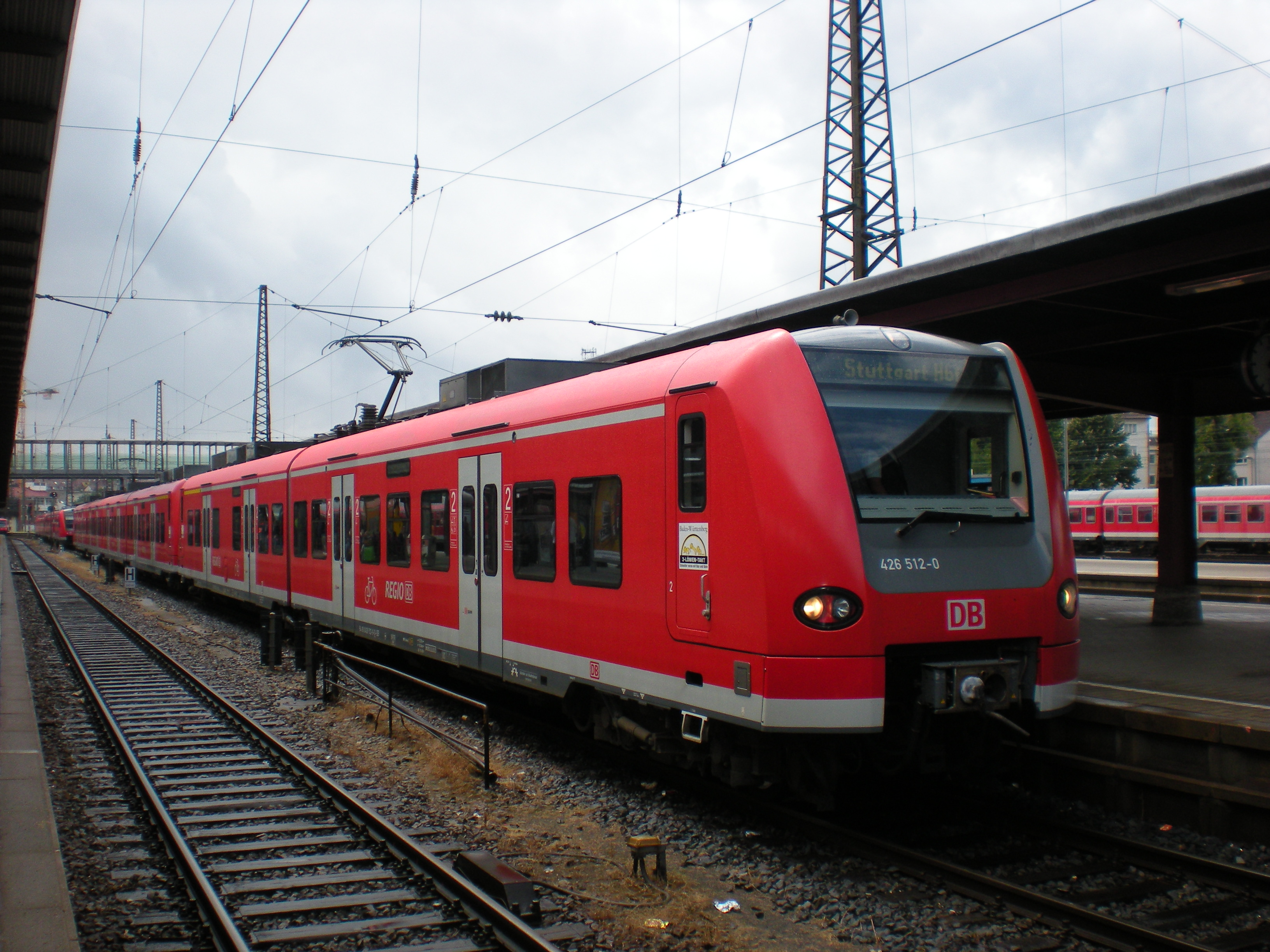 Zug der Baureihen 426 und 425 als Regionalbahn nach Stuttgart Hbf am Gleis 2 des Ulmer Hauptbahnhofs